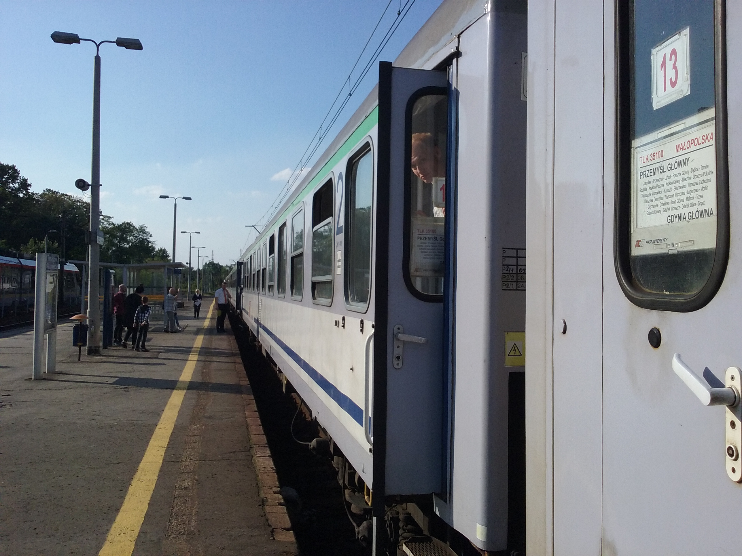 InterCity do Gdyni na stacji kolejowej Tomaszów Mazowiecki, PL, EU. CC0